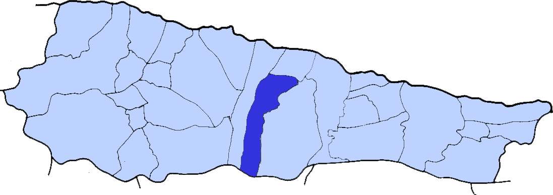 Localización de Porrua en el Concejo de Llanes